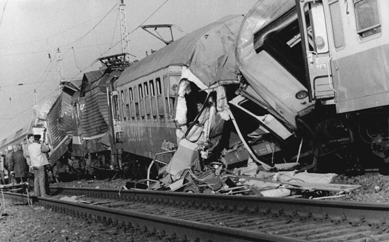 ADN-ZB Reiche-15.2.1988-kb Berlin: Zugkollision-Zwischen den Bahnhöfen Schönefeld und Berlin-Karlshorst fuhr der Schnellzug EX 150 Meiningen Berlin nahe dem Haltepunkt Eichgestell auf das Triebfahrzeug der Vorortzuges 11413 Werder-Karlshorst auf, das im sogenannten Wendebetrieb am Schluss dieses Zuges fuhr. Die Lokomotiven und je ein Wagen beider Züge entgleisten. An drei weiteren Schnellzugwagen entstand Sachschaden. Sechs Personen wurden schwer und 28 Reisende leicht verletzt. - siehe dazu ADN-Meldung